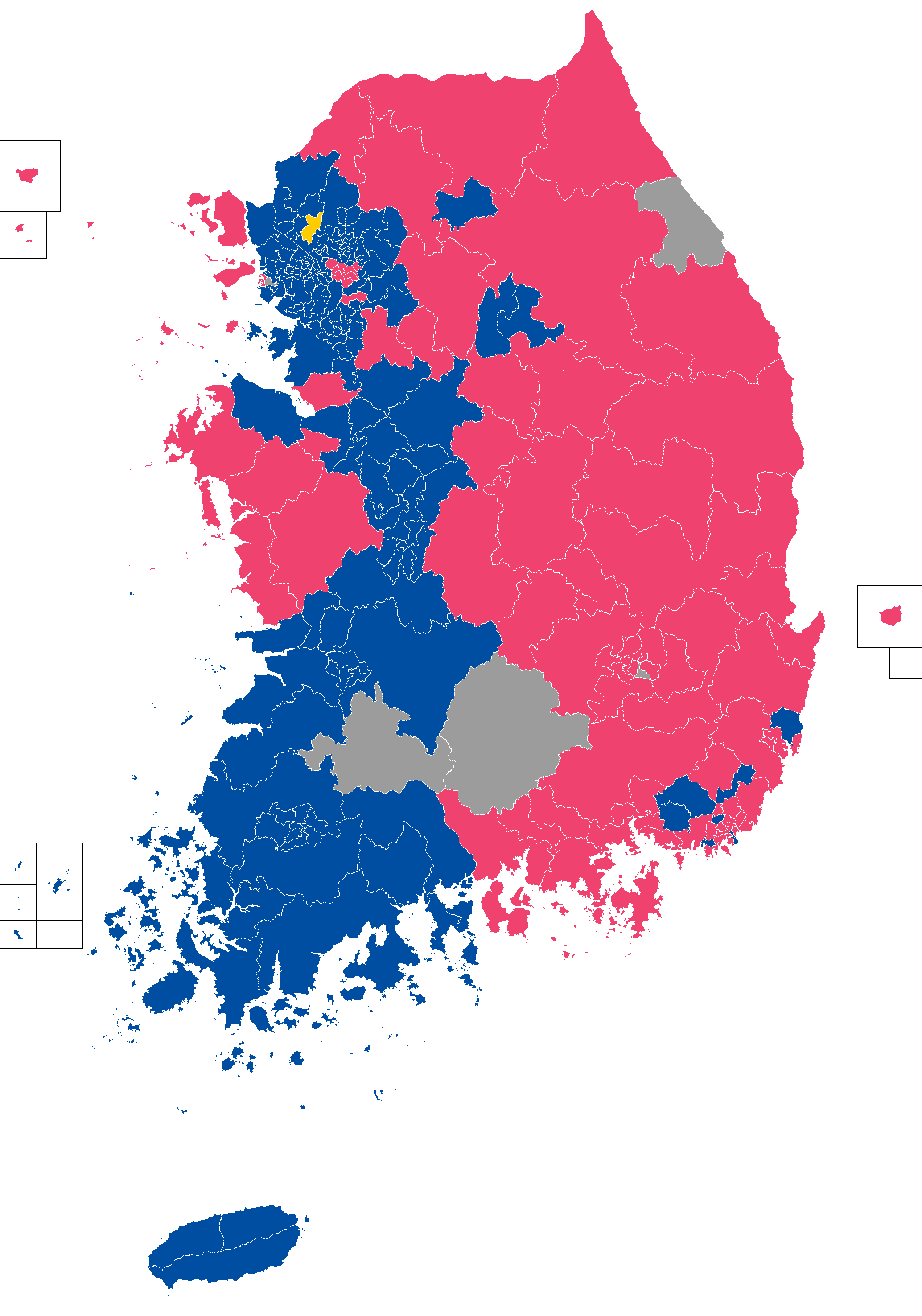 대한민국 제21대 국회의원 선거 지역구 결과